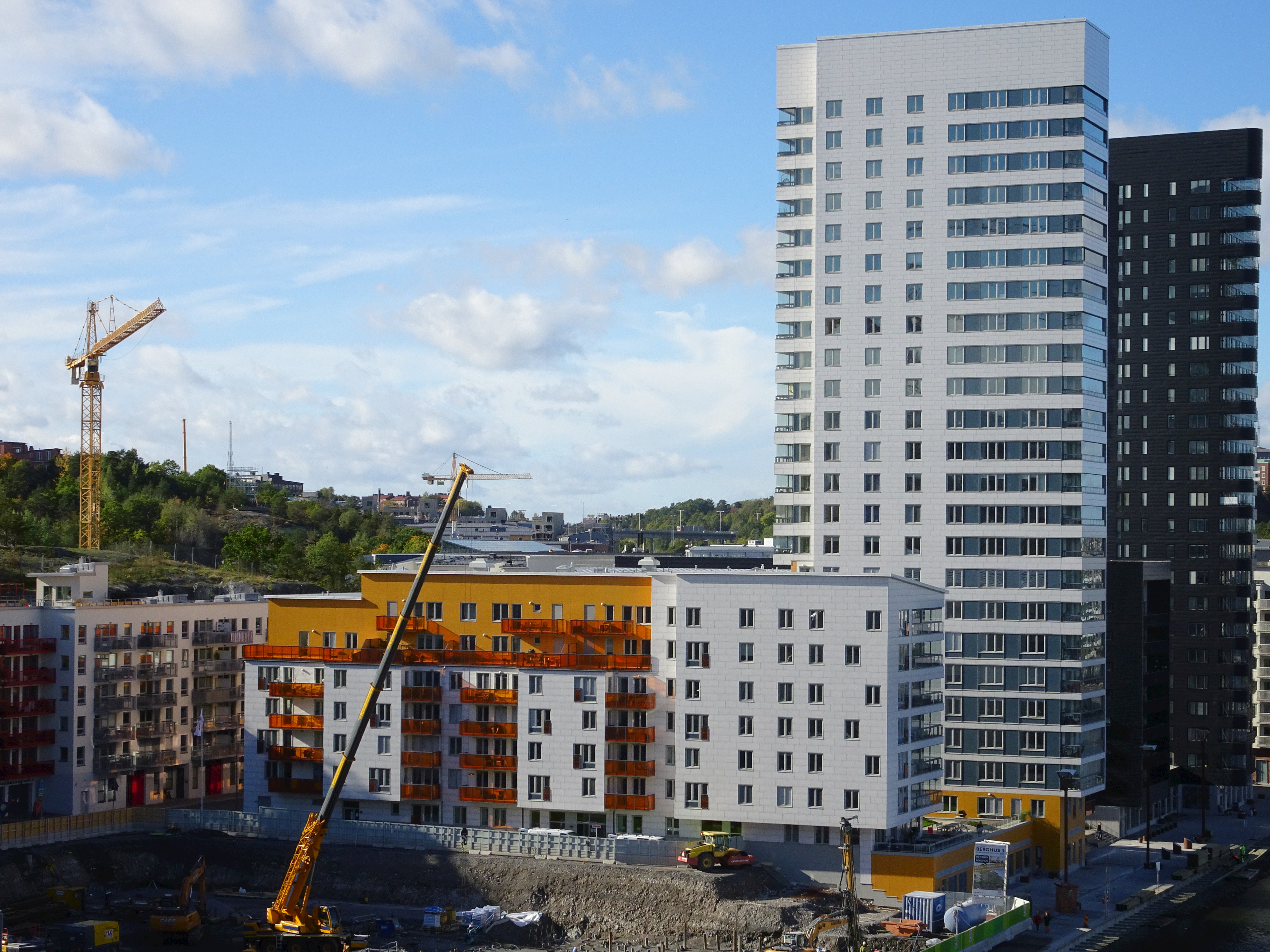 Kajen 5 (närmast) och Kajen 4, Liljeholmskajen